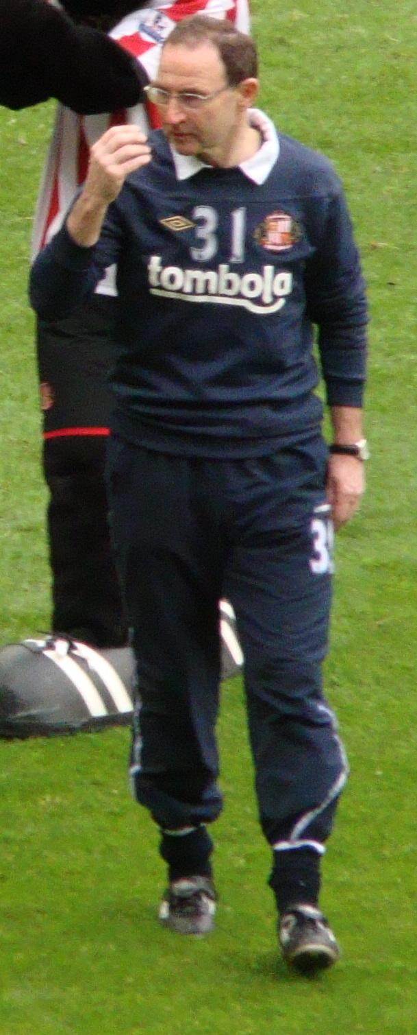 SAFC squad 2011/12